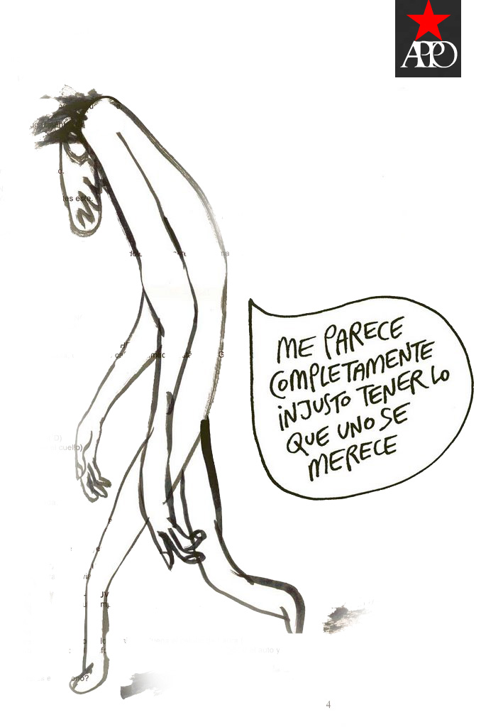 Dibujo en tinta sobre el afán de la APPO